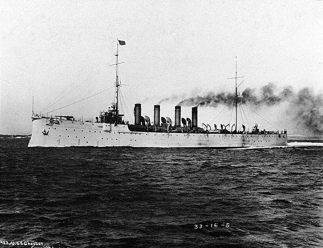 USS Chester (CL-1)